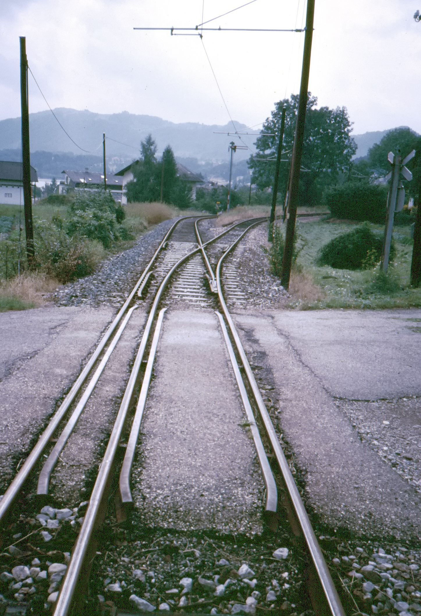 Trennung der beiden Spurweiten an der Traunseebahn oberhalb von Gmunden. Links führt die Normalspurstrecke zum Seebahnhof, rechts die Meterspurstrecke nach Gmunden-Traundorf